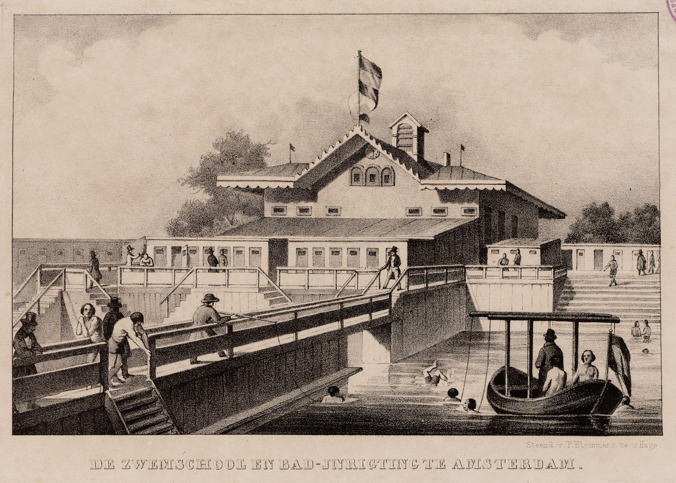 Beschrijving De zwemschool en bad-inrigting te Amsterdam De Zwemschool, Westerdokdijk 27-28, opgericht in 1846 door C.W. Ploenius en gesloten in 1920. Techniek: steendruk. Documenttype prent Vervaardiger Blommers, P. Collectie Collectie Stadsarchief Amsterdam: tekeningen en prenten Datering 1846 Geografische naam Westerdoksdijk Inventarissen Afbeeldingsbestand 010097005052